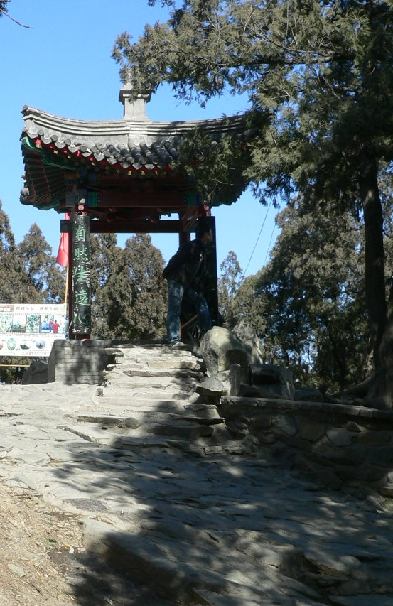 八大处方亭